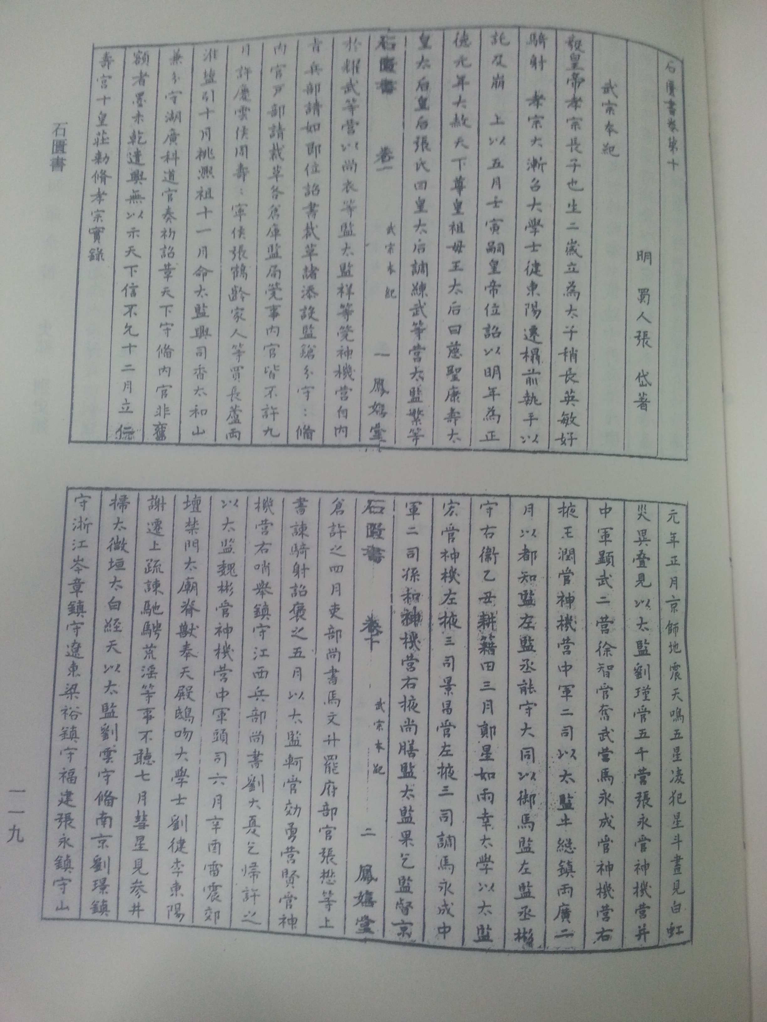 文言: 石匱書卷十